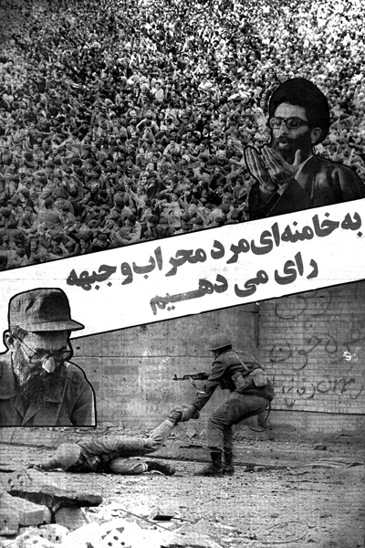 پوستر تبلیغات سید علی خامنه‌ای برای انتخابات ریاست جمهوری ایران